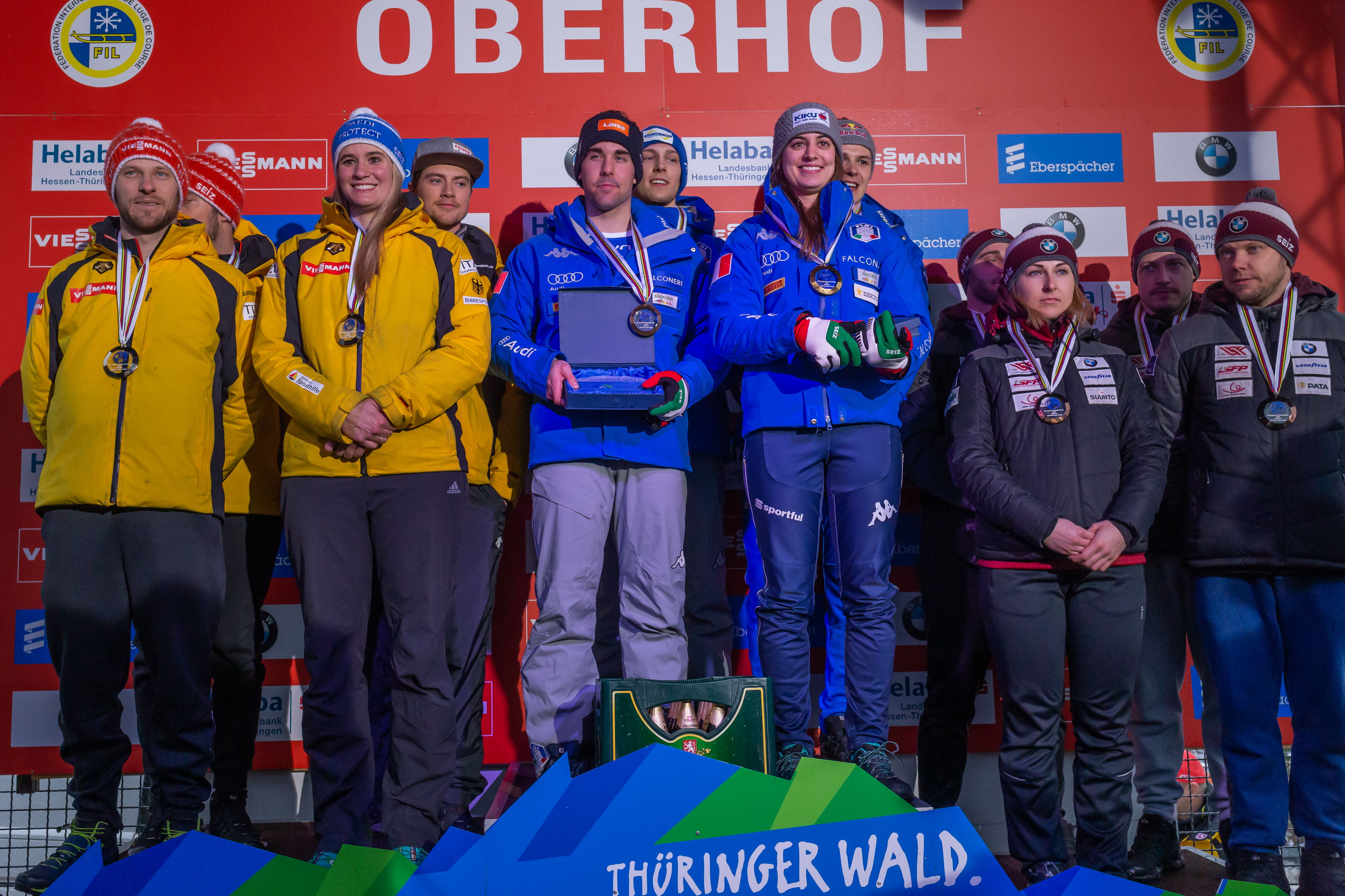 Viessmann Luge World Cup Oberhof; v.li.: Deutschland, Italien, Lettland; Siegerehrung Teamstaffel